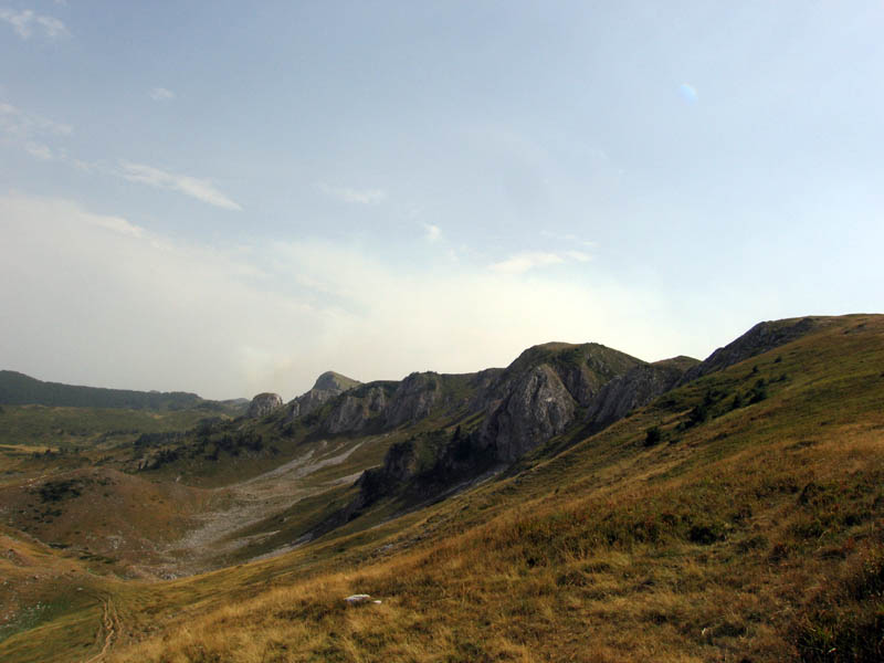 Predeli iznad Šiškog jezera